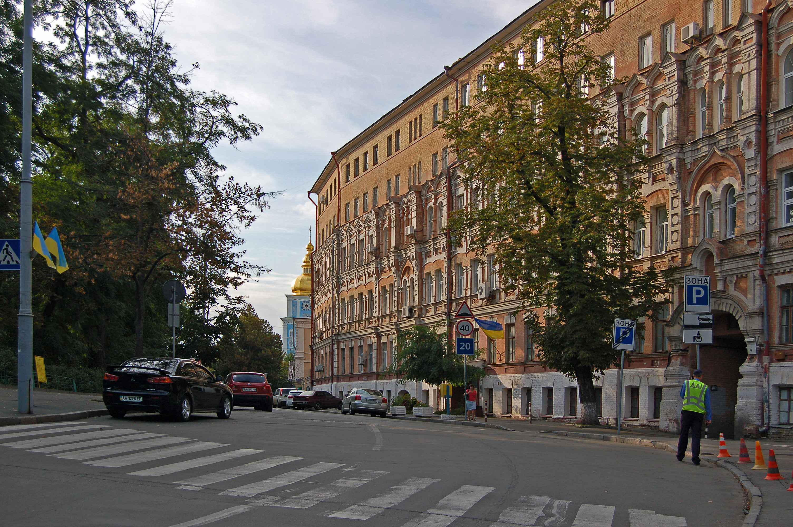 Трёхсвятительская улица в Киеве